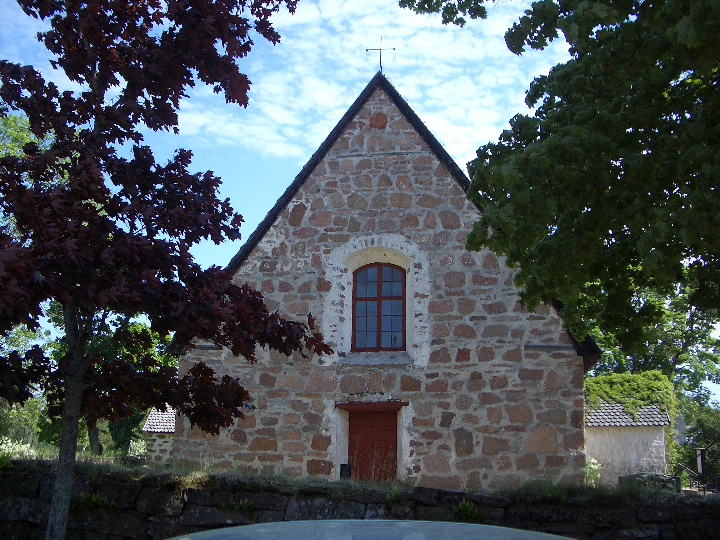 Geta kyrka i Vestergeta, Geta. Helgad åt S:t Göran, delvis uppförd på 1460-tal.